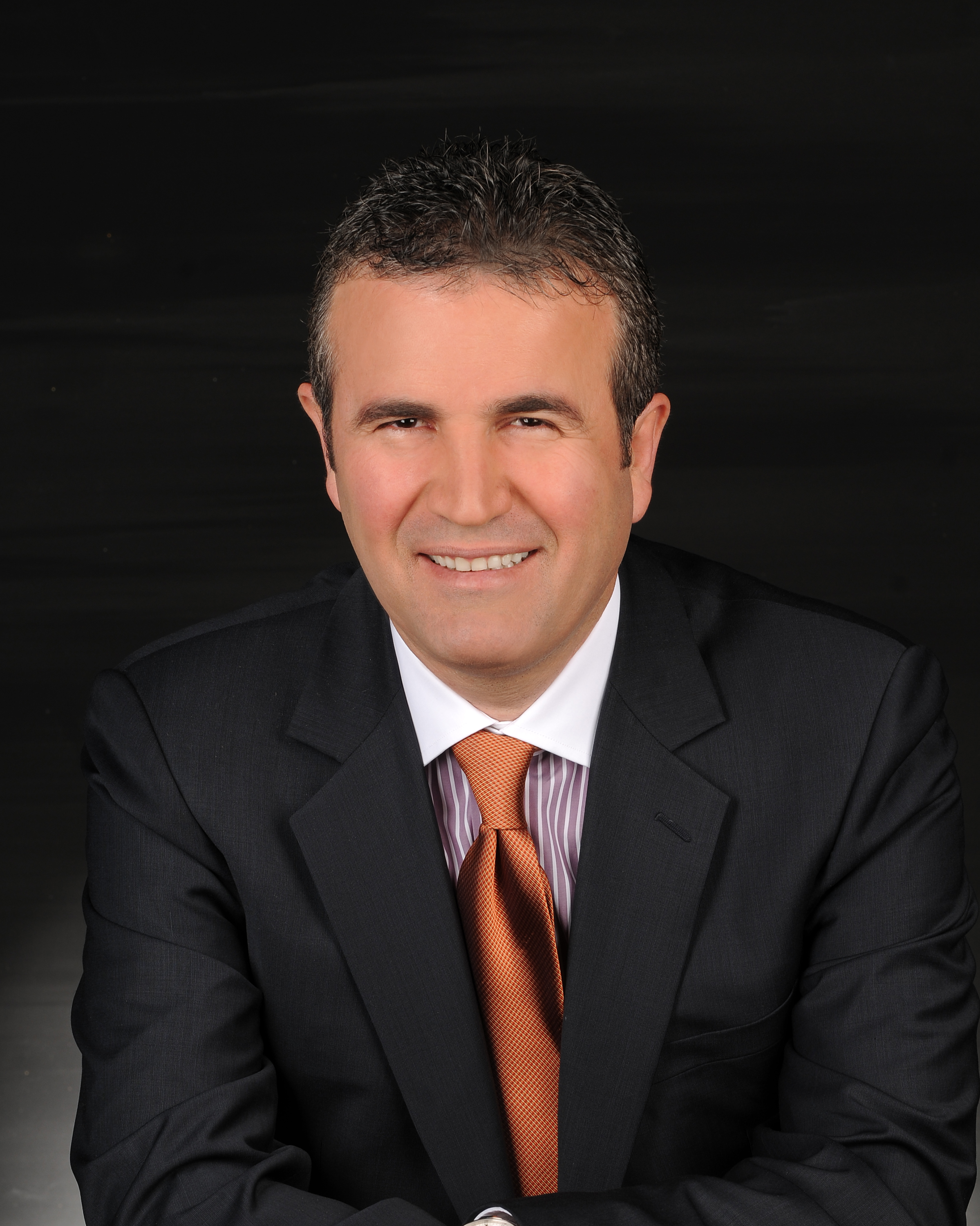 25. Dönem Tokat Milletvekili Abdurrahman Başkan